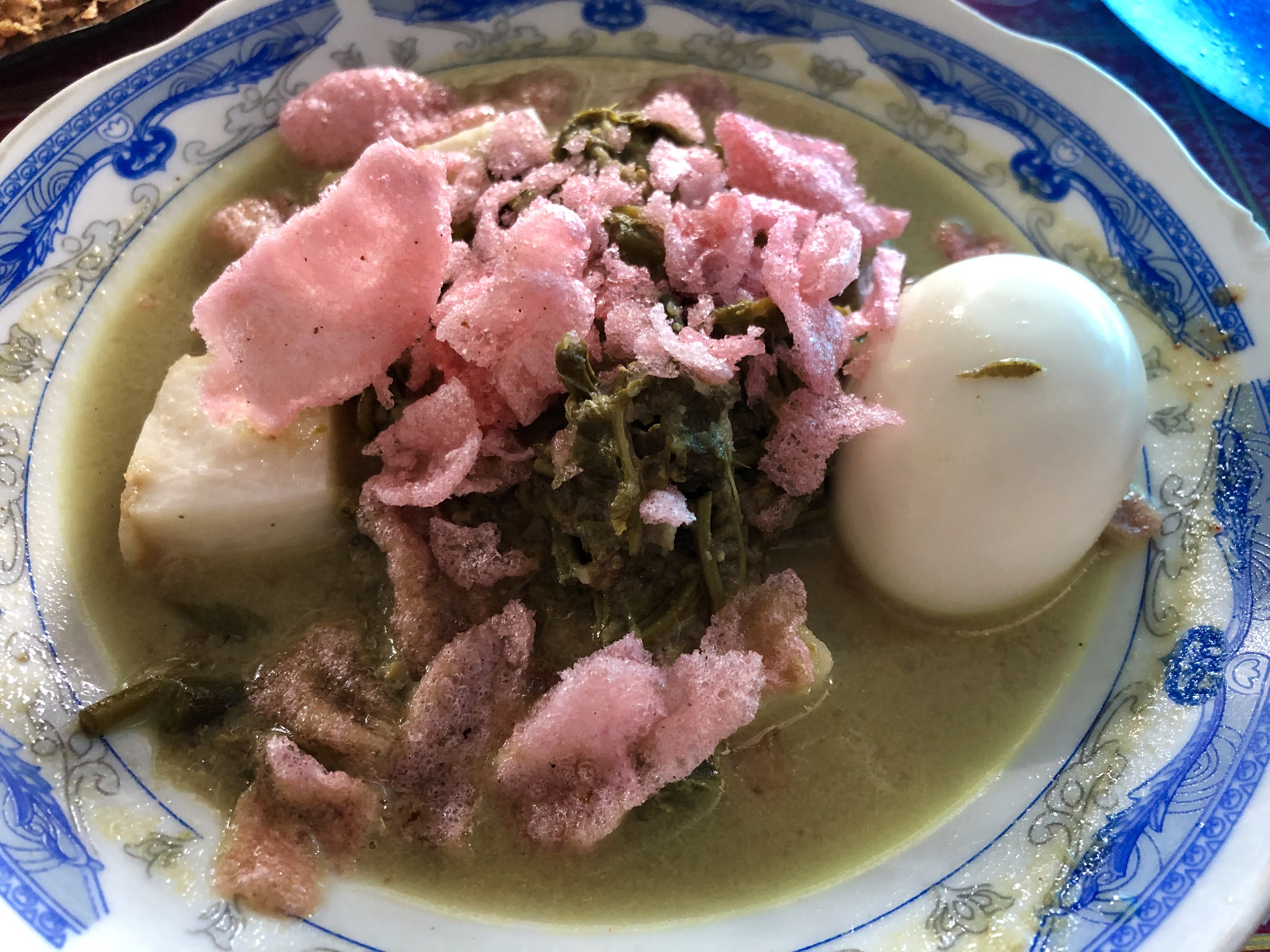 Katupek Gulai Paku, Sumatera Barat